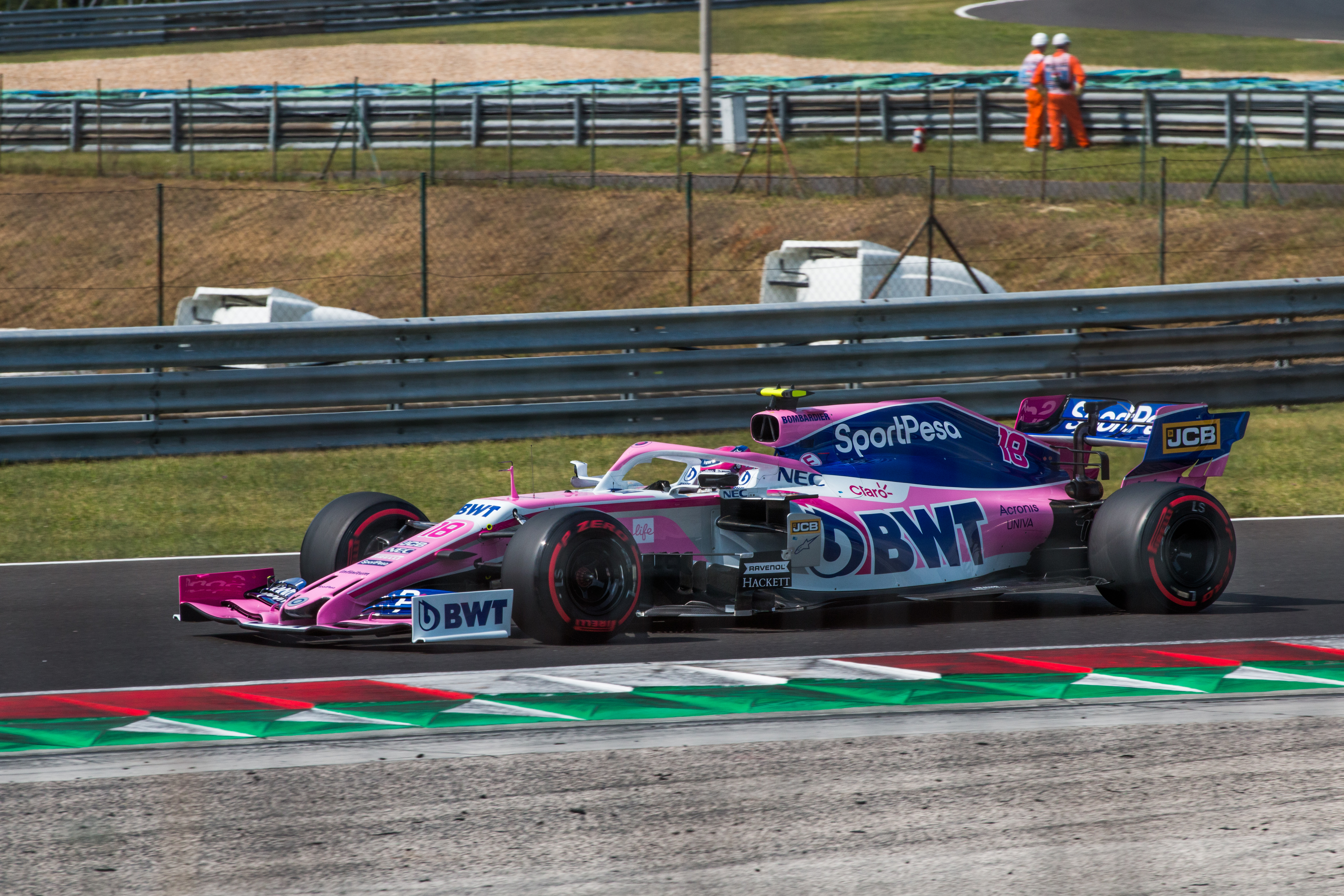 Lance Stroll in his Racing Point RP19 during Formula 1 Hungarian Grand Prix 2019 on the Hungaroring